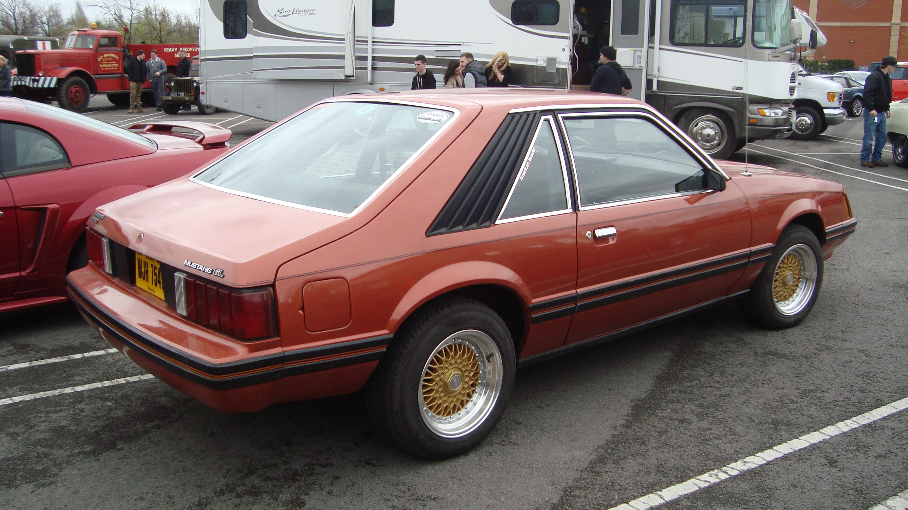 1982 Ford Mustang 3.3 GL